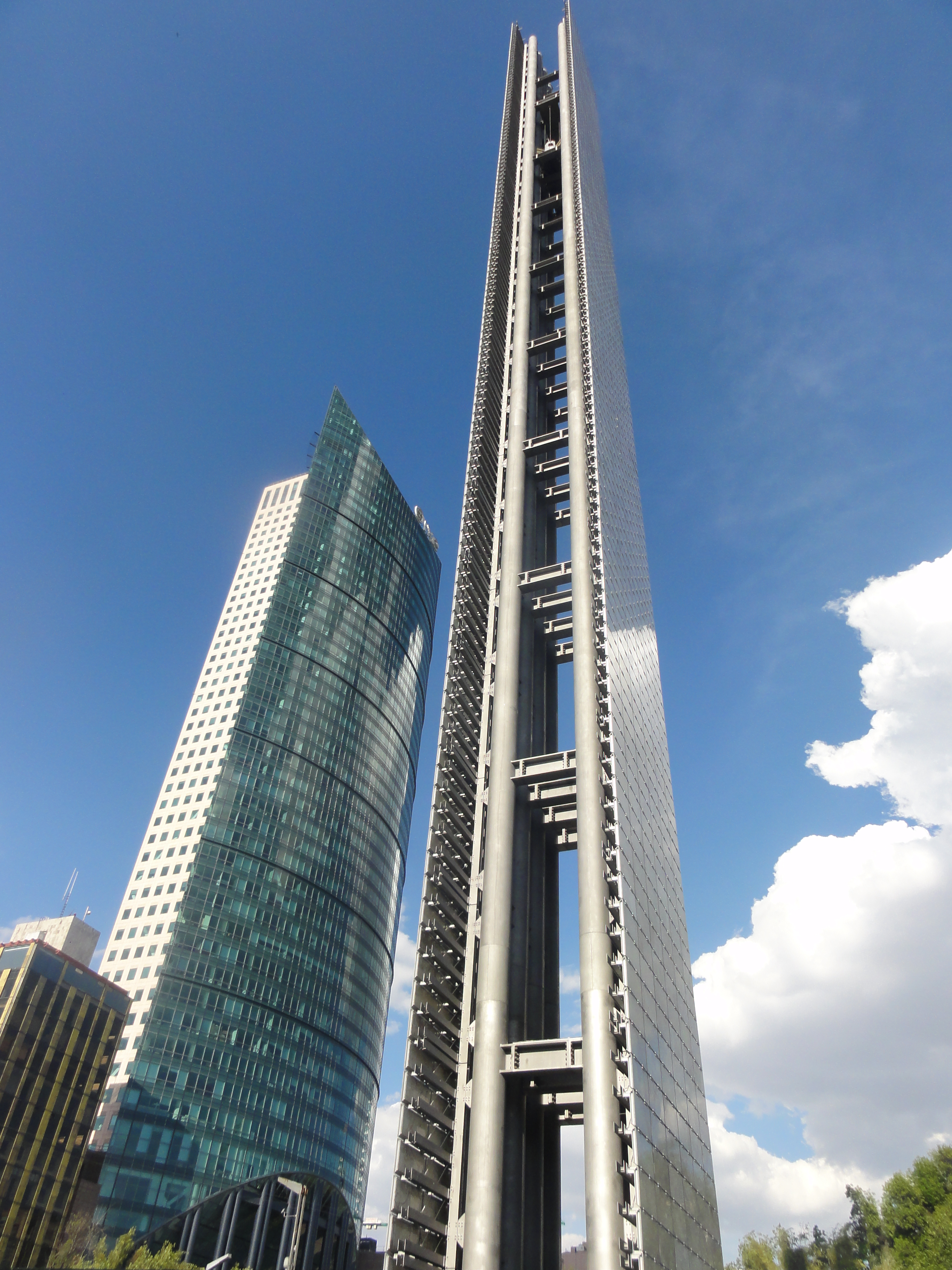 Estela de Luz